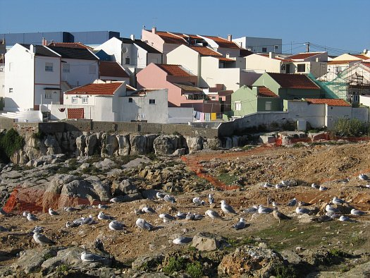 Fotografia por: Osvaldo Gago